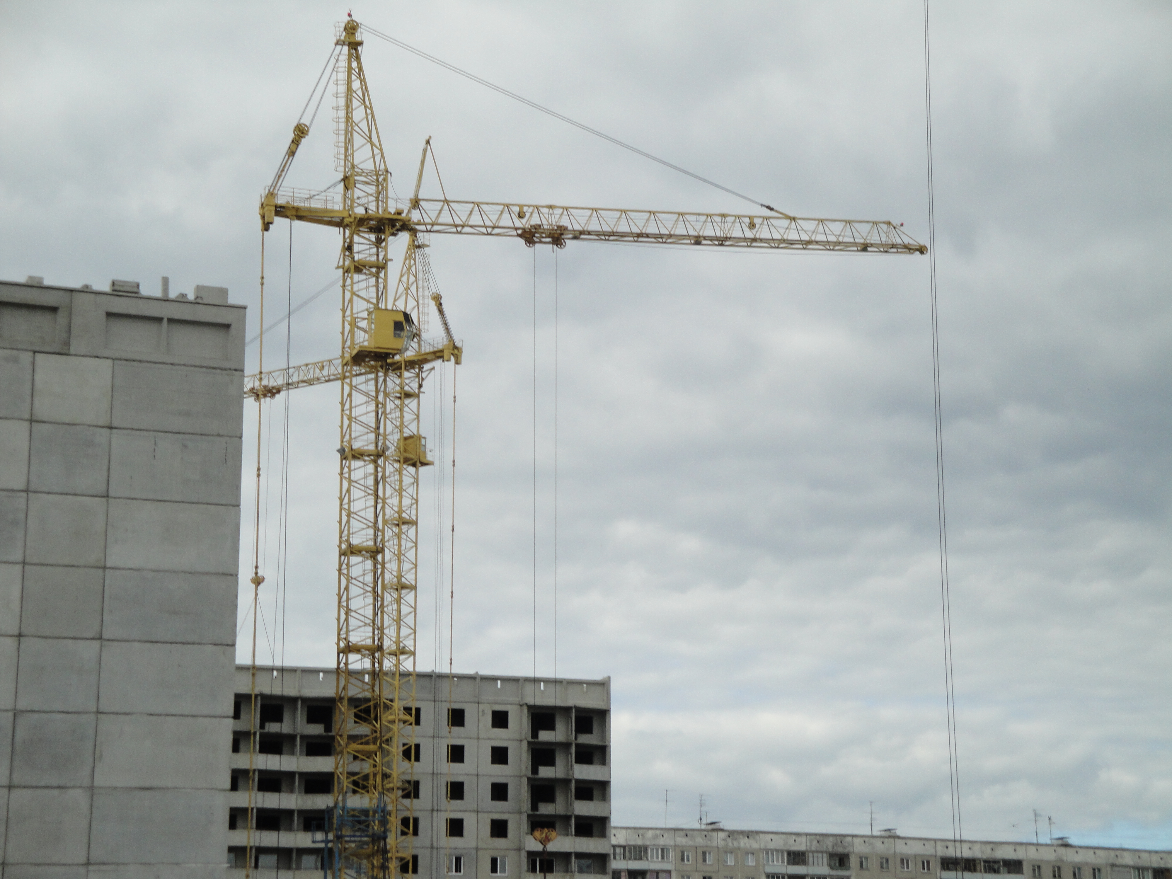 Краны КБ-515 - общий вид на верхнюю часть крана, Новосибирск